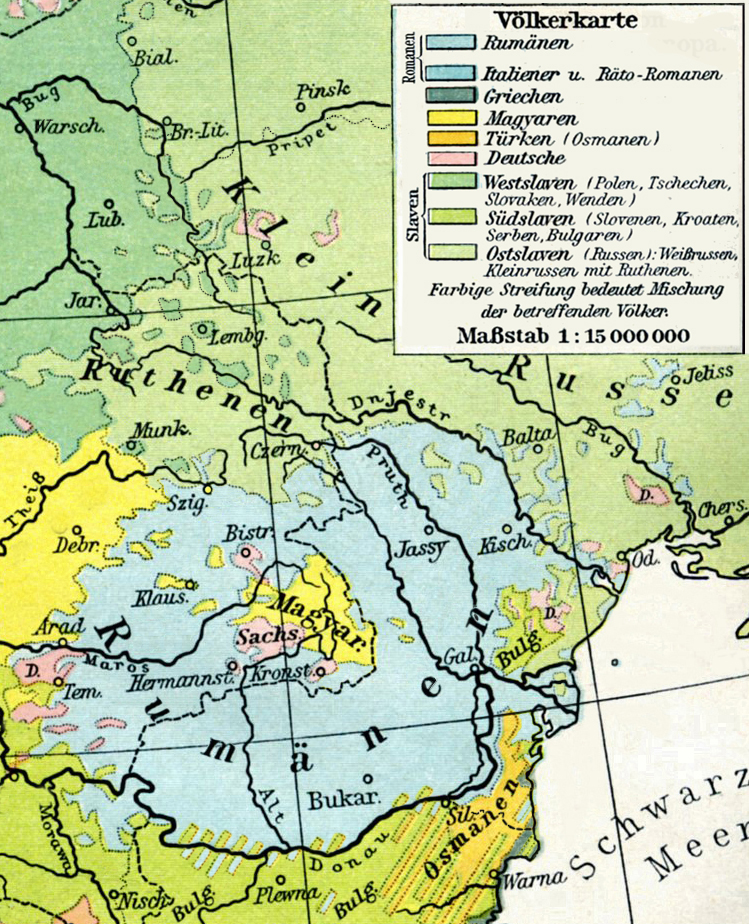 Europe roumanophone en 1896